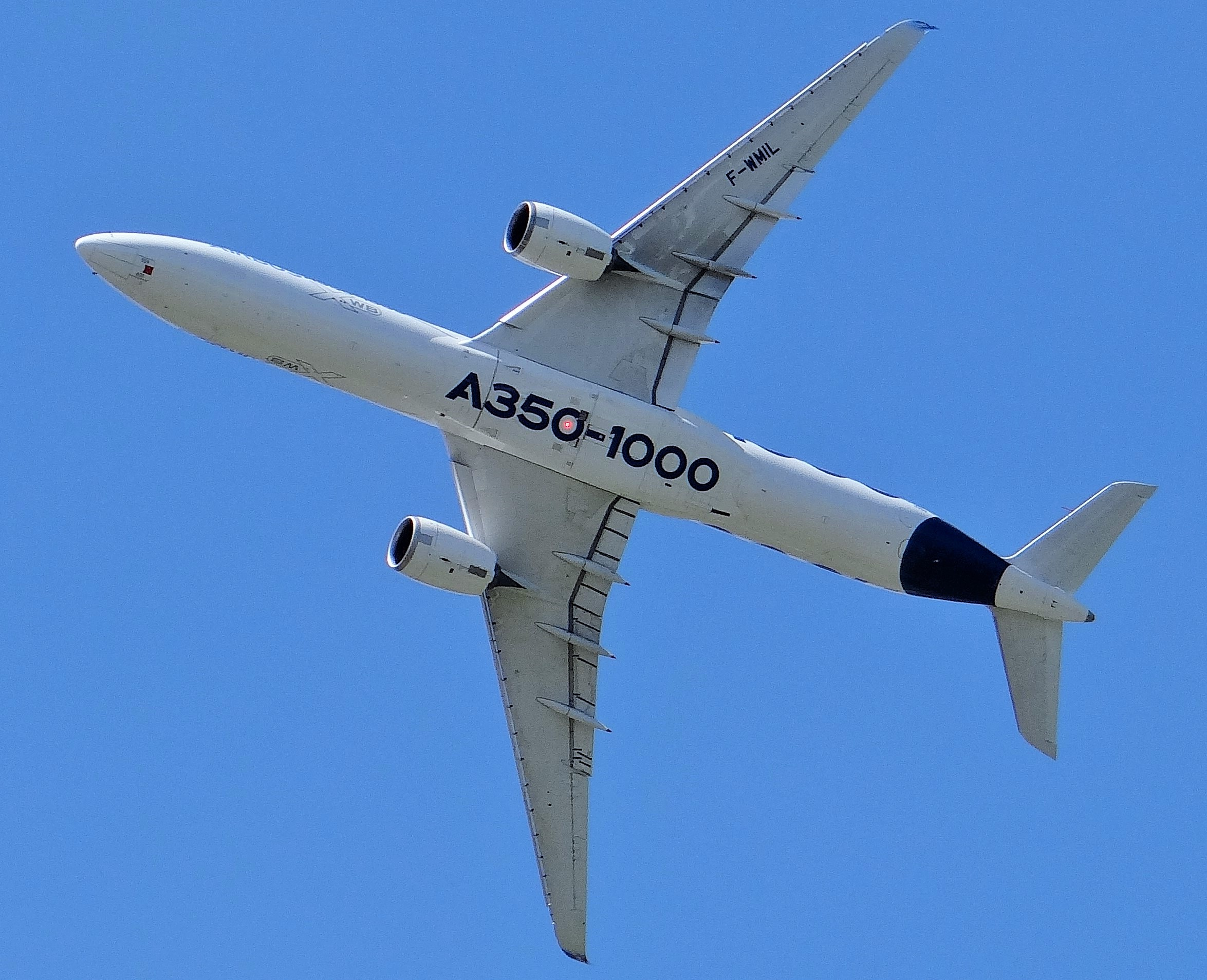 Airbus A350 1041 MSN 59 F-WMIL au salon de Paris le Bourget, juin 2019, démonstration en vol